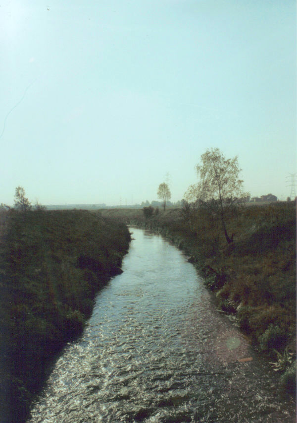 Rzeka Brynica, przepływająca przez Przełajki - dzielnice Siemianowic Śląskich